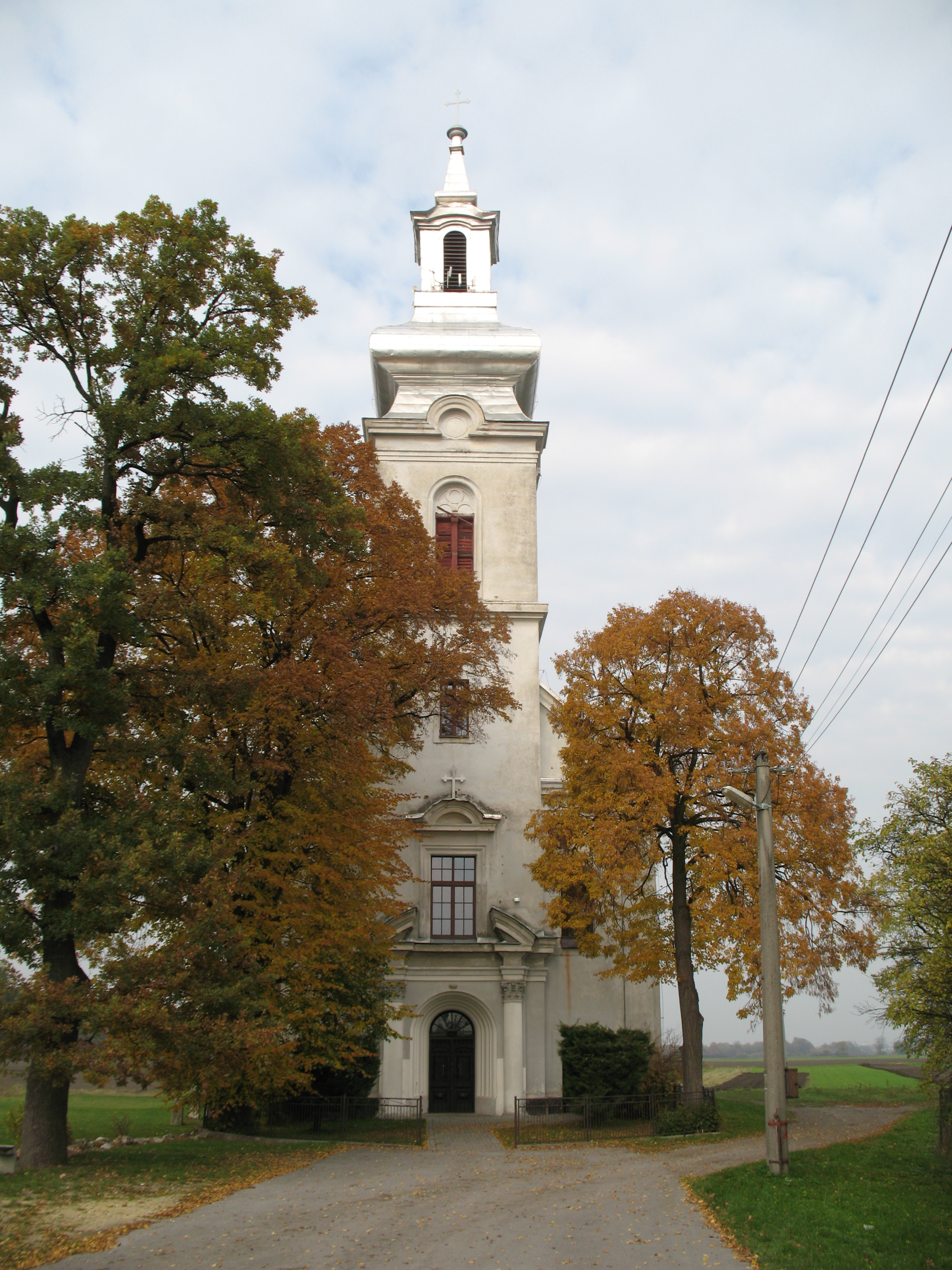 Pribóc